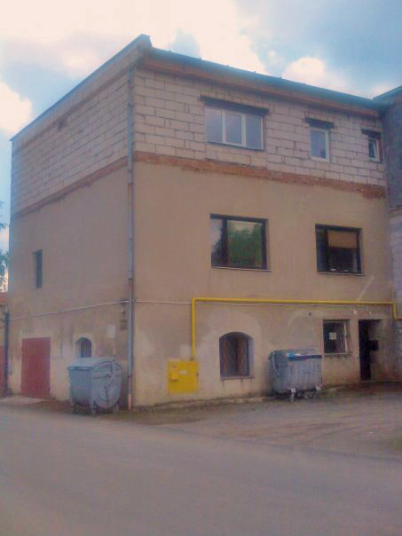 Fotografie budovy v Černé Hoře, kde byla čalounická továrna, kterou vedl František Kressa se svým bratrem Miroslavem